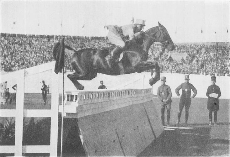 Le cavalier français Pierre Bertran de Balanda sur Papillon aux jeux olympiques d'Amsterdam en 1928.